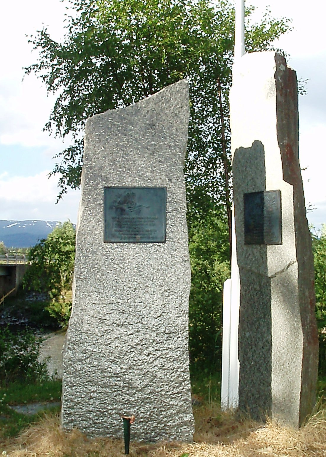 Jørstadelva krigsminne, Snåsa, reist 1995 til minne om sabotasjeaksjon mot jernbanebrua 13. januar 1945Jørstad river war memorial, erected 1995 to commemorate the SEO attack on the Jørstad river railway bridge january 13th 1945